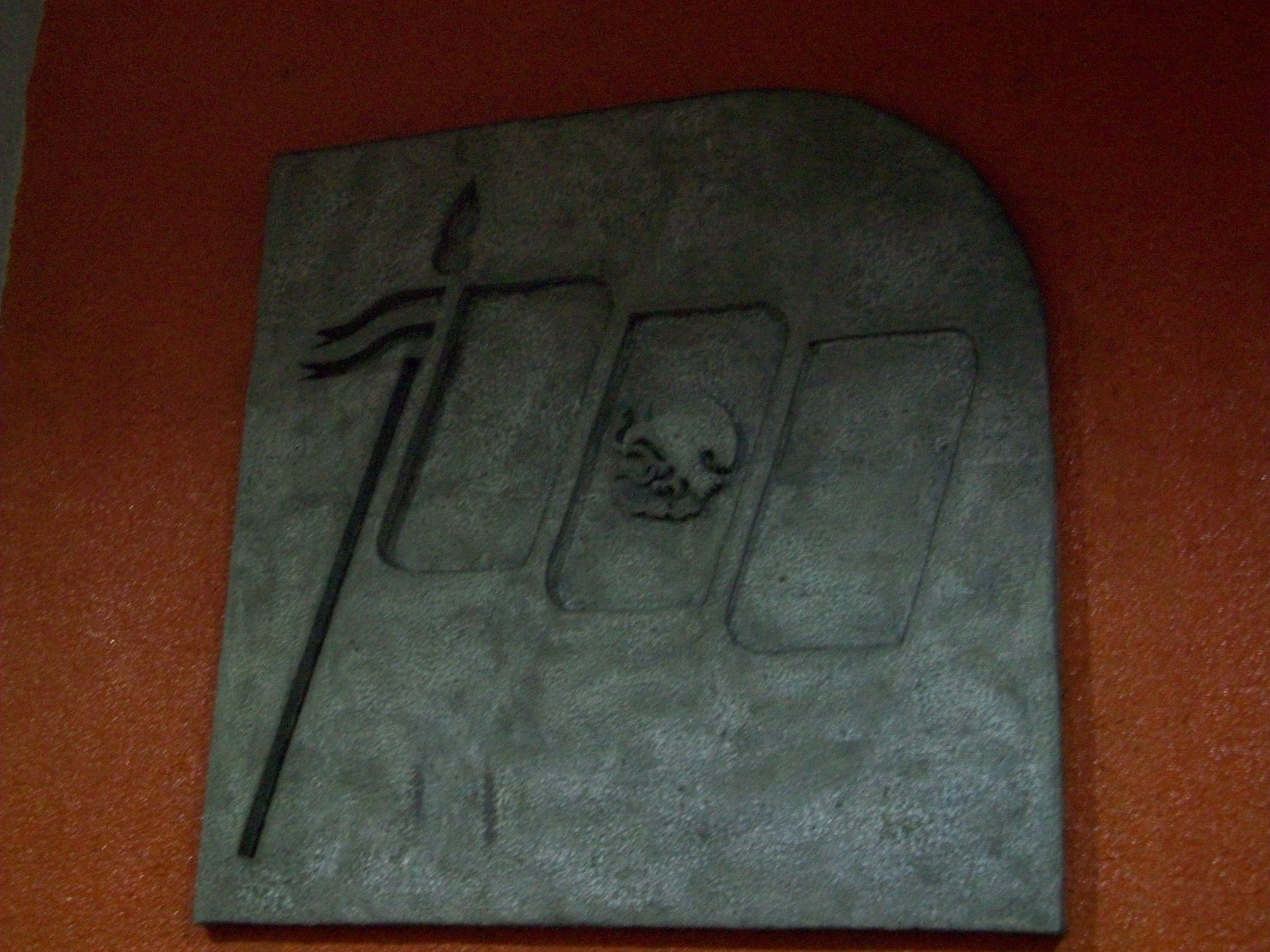 grabado del simbolo de la estacion patriotismo